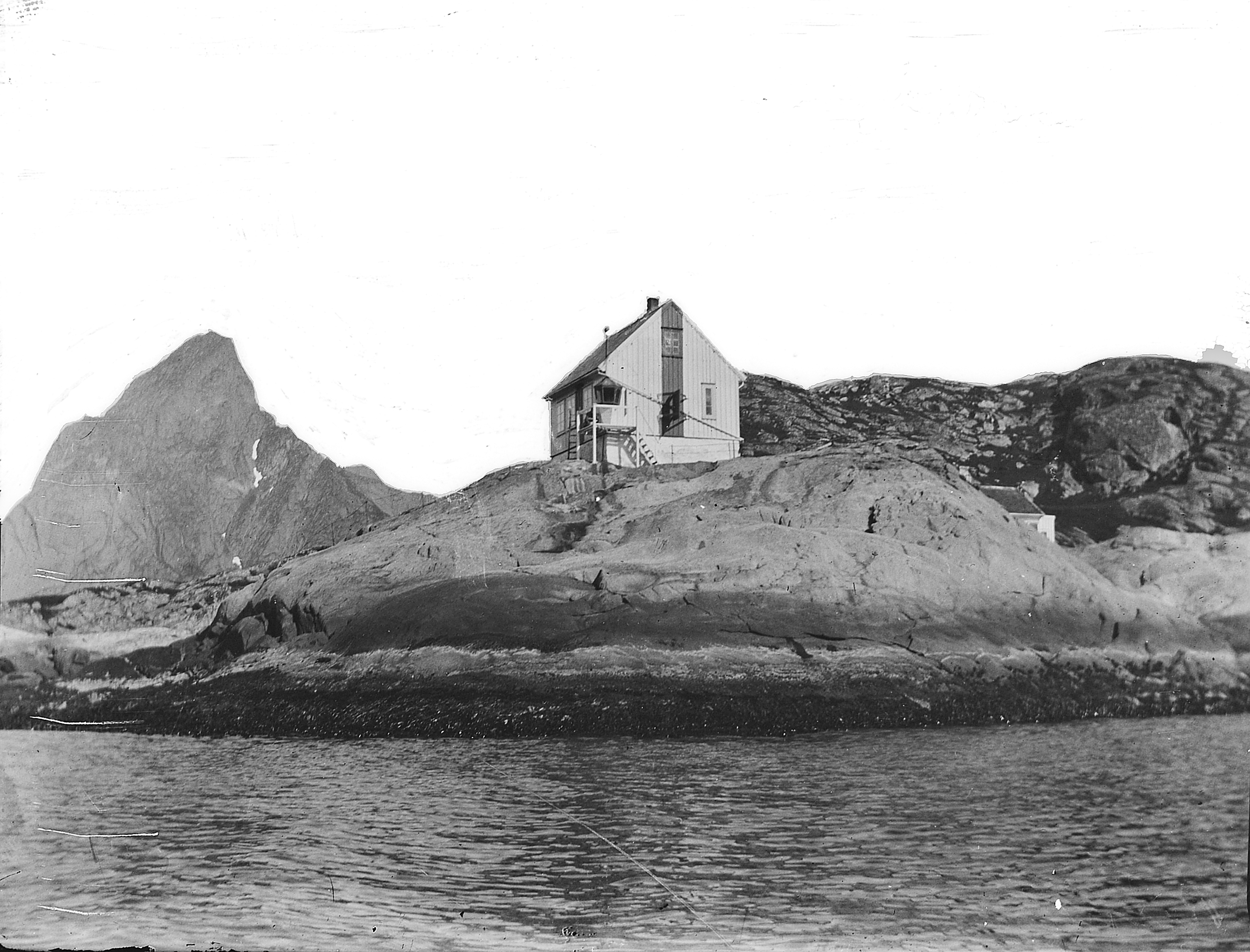 Bildet er hentet fra Arkivverket. Reine, Moskenes Arkivinstitusjon : Riksarkivet Arkivnavn : Fyrdirektoratet Sted : Norge, Nordland, Moskenes, Reine Emneord: Fyr, Kyst Avbildet